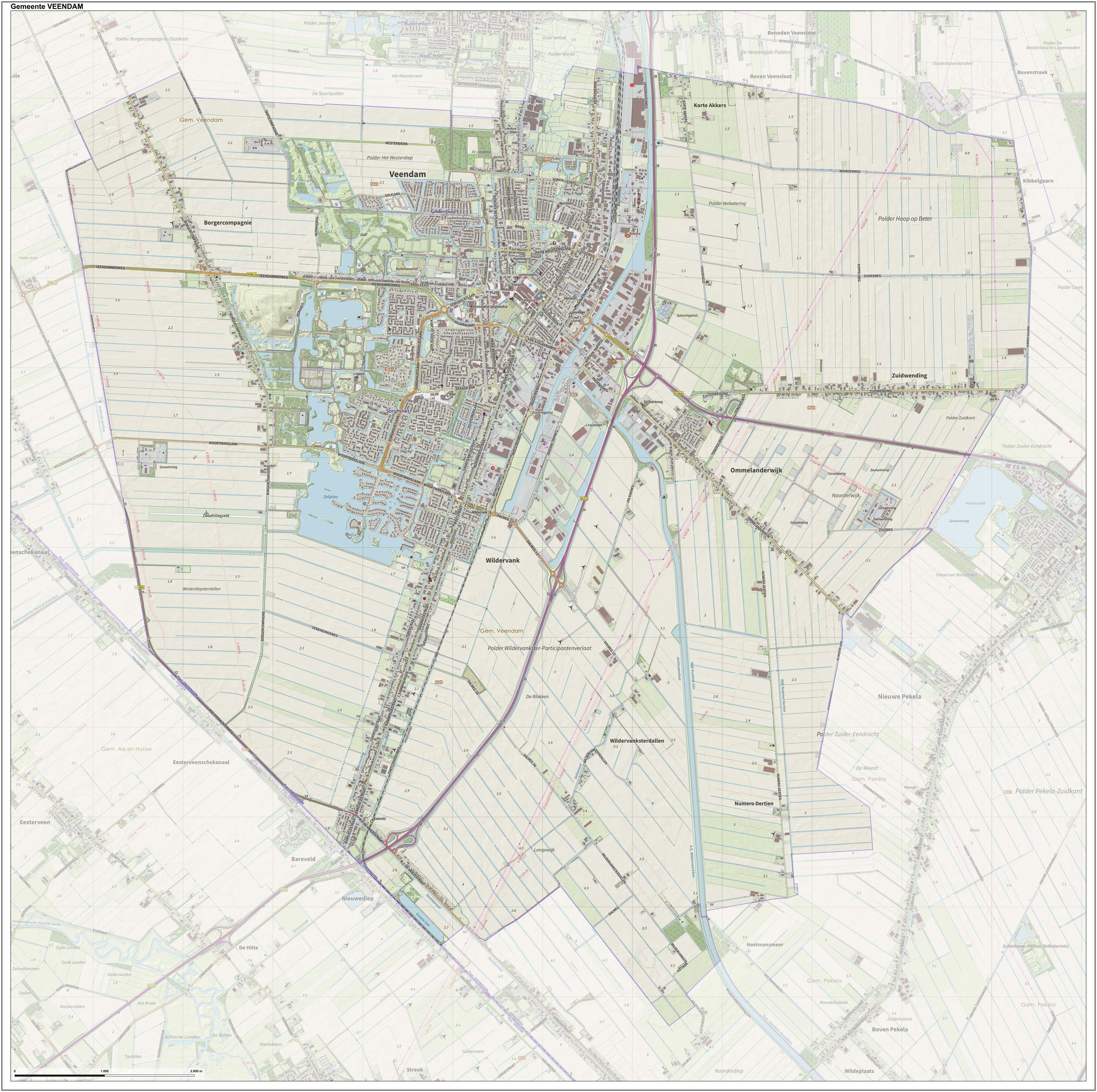 Topografische gemeentekaart. Resolutie: 400 pixels/km. Kaartbeeld samengesteld uit de open geodata van de Top10NL en Top25namen (Kadaster), Creative Commons-BY licentie. Gebouwvlakken uit open geodata BAG extract. Wegen uit de OpenStreetMap, OpenStreetMap community. Reliëfschaduw uit de Actuele Hoogtekaart AHN2. Samenstelling en kleurenschema: Jan-Willem van Aalst, met QGIS. Zie ook de Legenda.